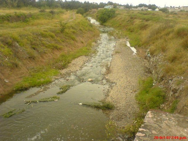 riachuelo de actopan durante la temporada de lluvias